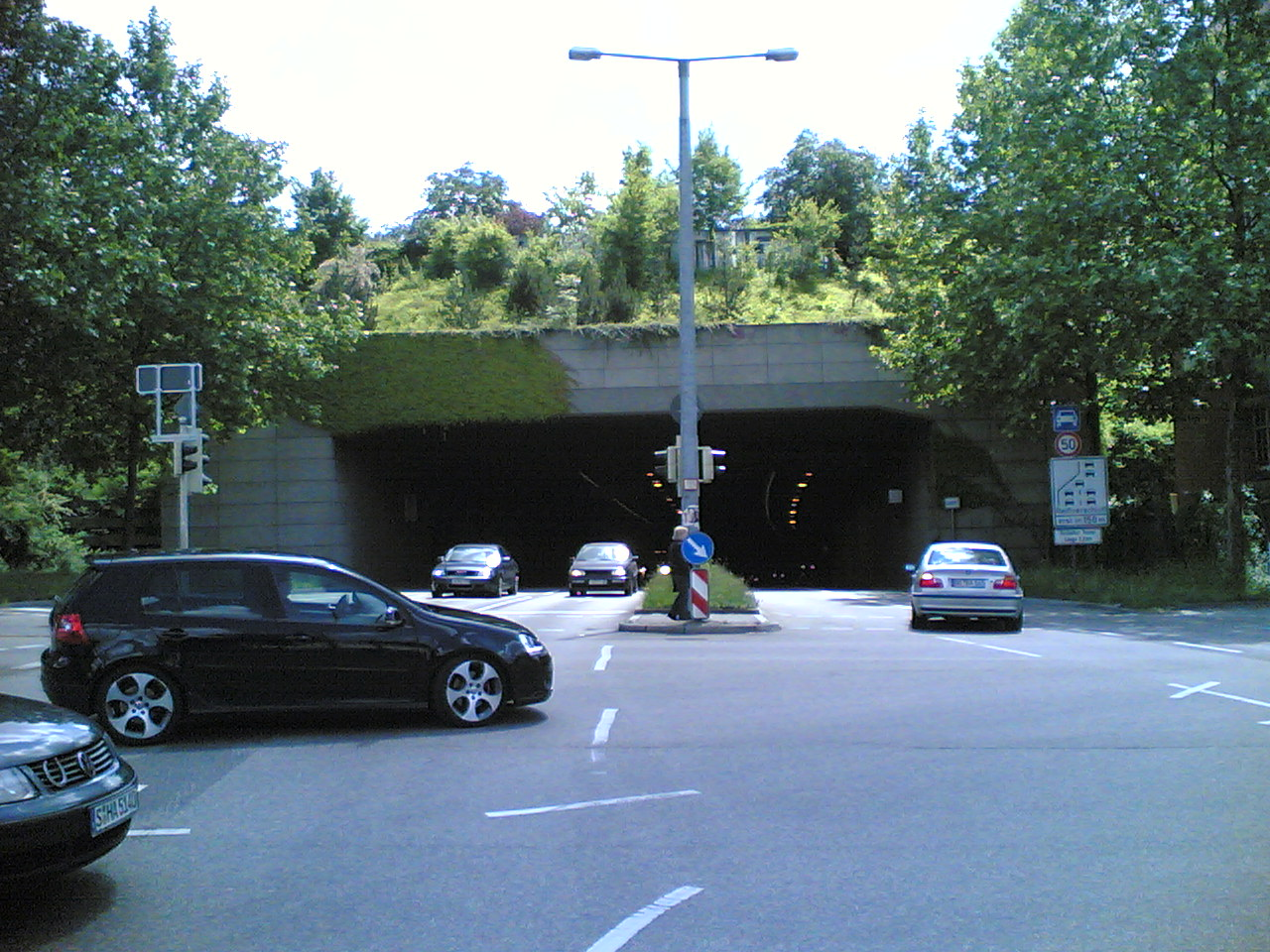 Stuttgart, Heslacher Tunnel